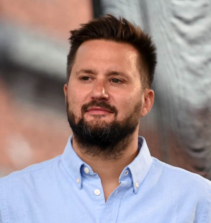 Matúš Vallo